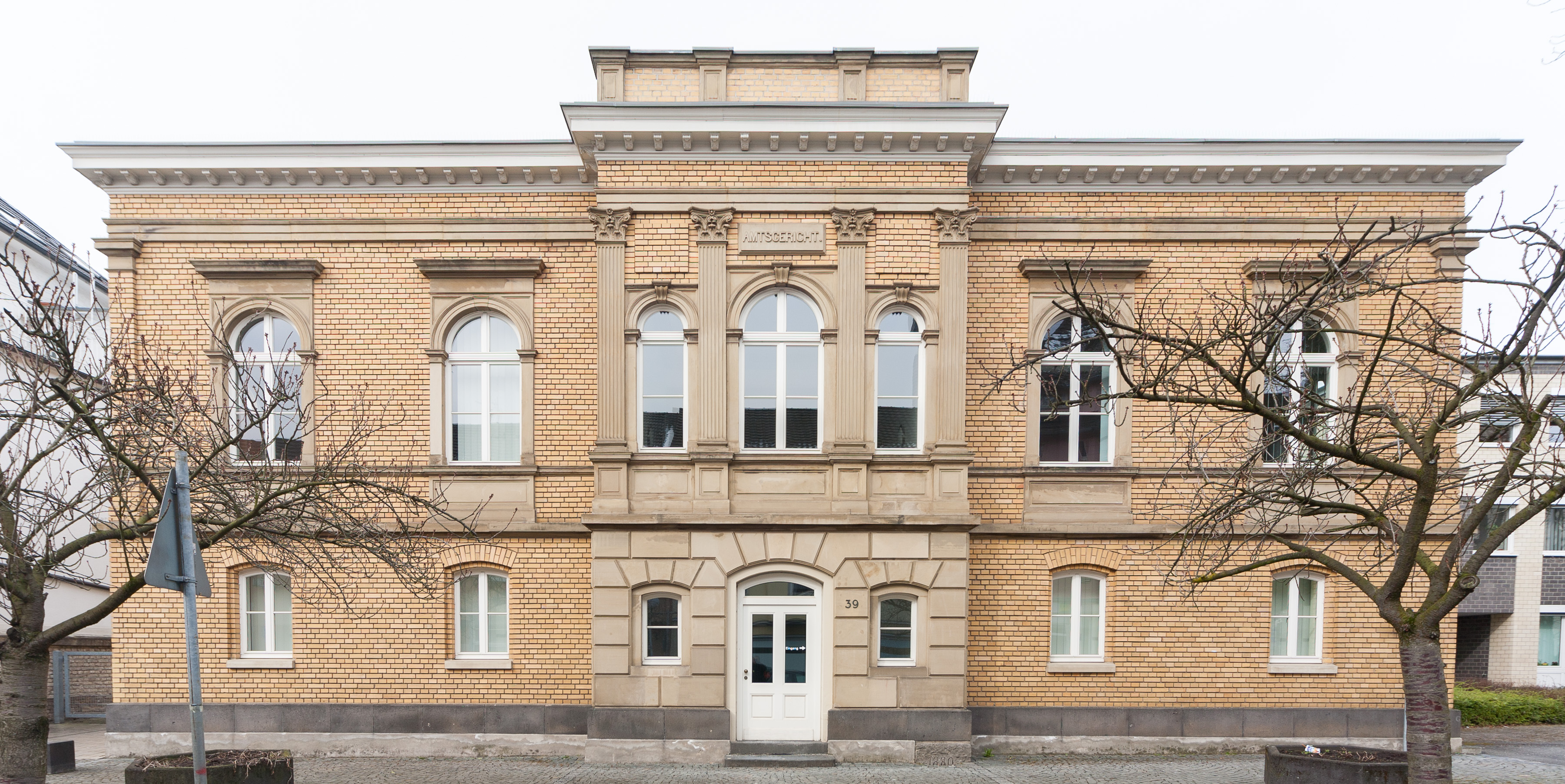 Amtsgericht: denkmalgeschützter Backsteinbau (erbaut 1880), Drachenfelsstraße (35–)39, Königswinter